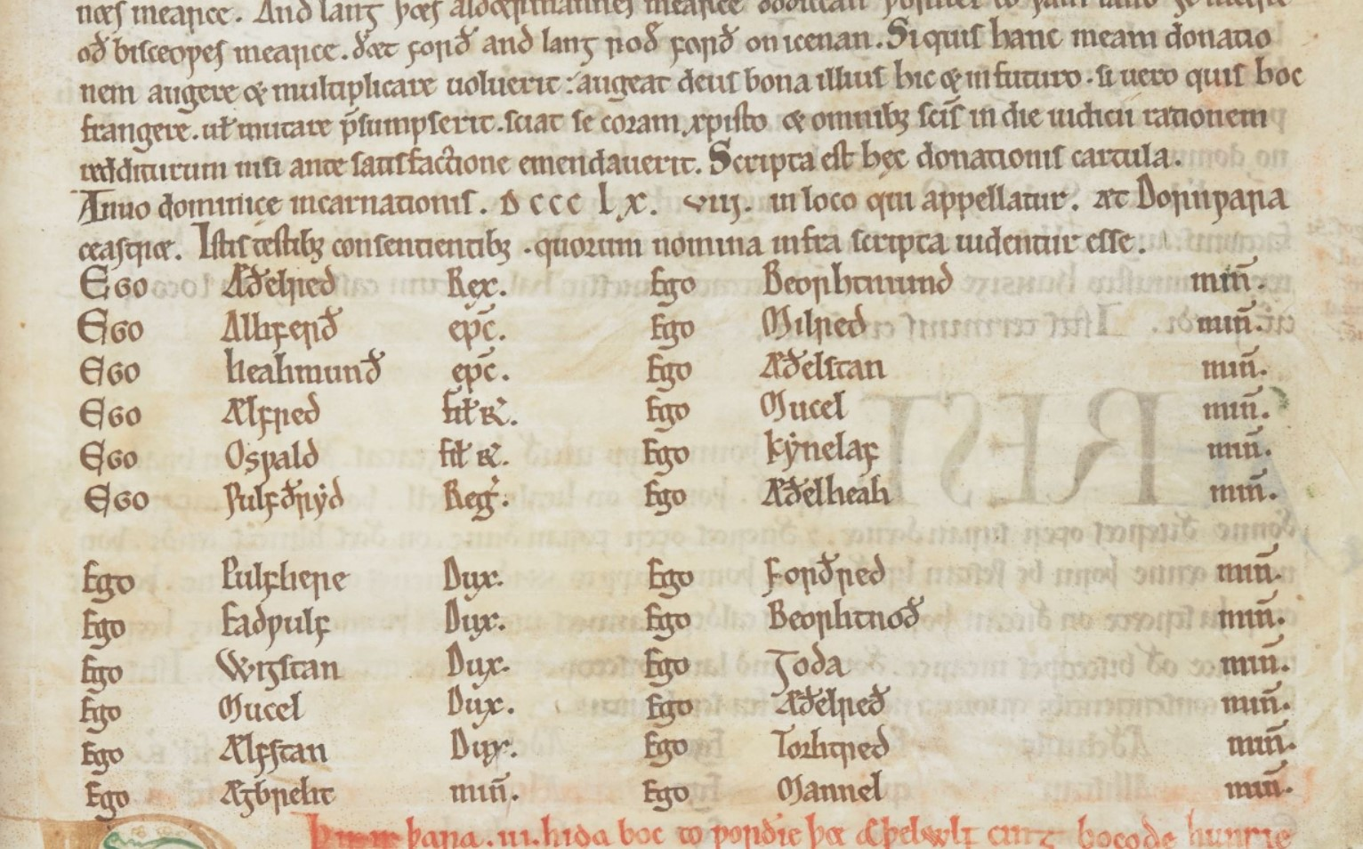 La liste des témoins de la charte S 340.